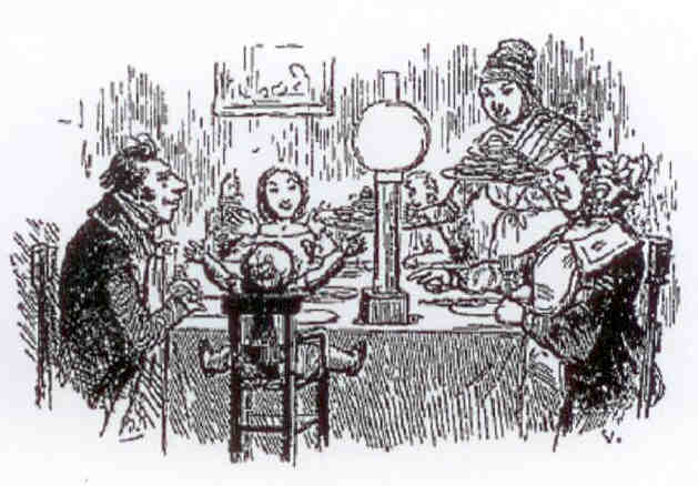 Les crêpes au Carnaval de Paris. Gravure extraite du livre de Théophile Lavallée Le diable à Paris : Paris et les parisiens : mœurs et coutumes, caractères et portraits des habitants de Paris, tableau complet de leur vie... (texte de MM. de Balzac, Eugène Sue, George Sand, et al.) ; séries de gravures avec légendes par Gavarni... vignettes par Bertall..., J. Hetzel éditeur, Paris 1845-1846.